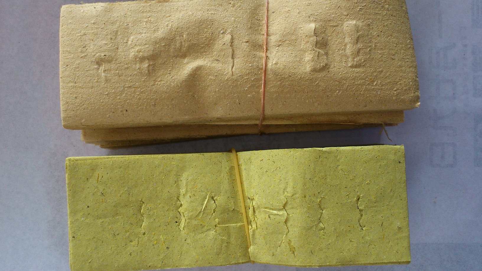 金白錢